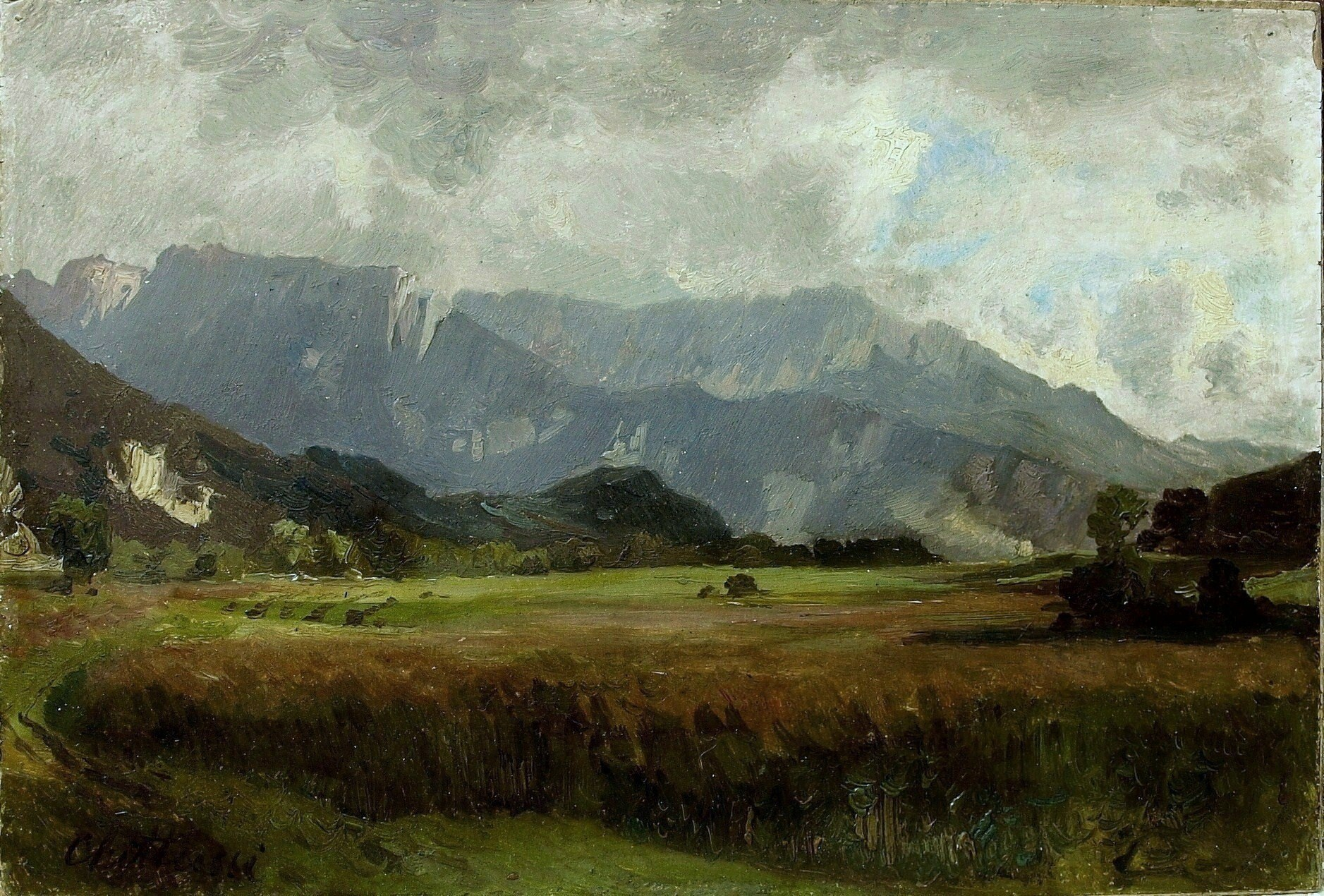 Antonín Chittussi 1890